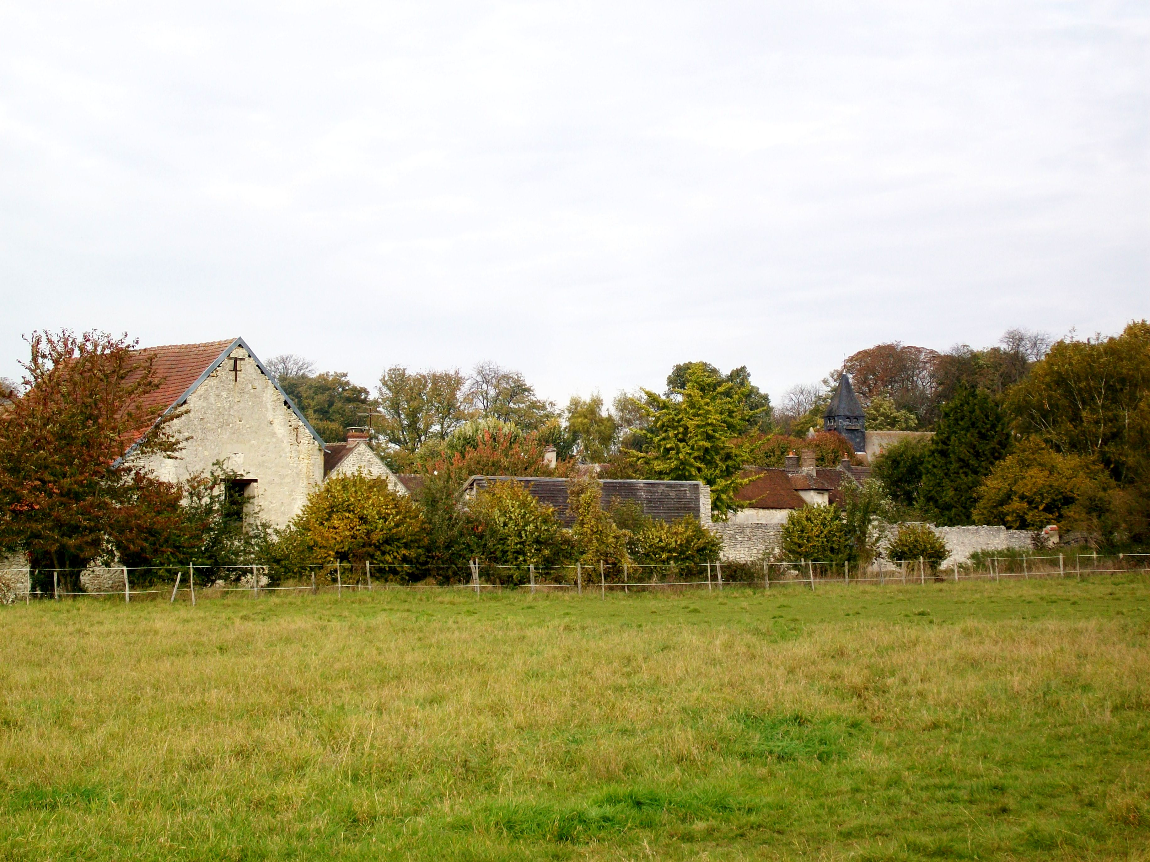 Vue sur le village depuis le sud-est.